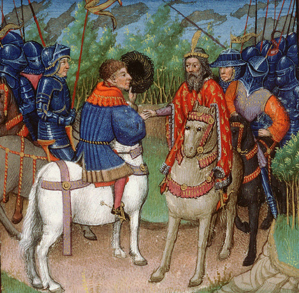 Godefroy z Bouillonu